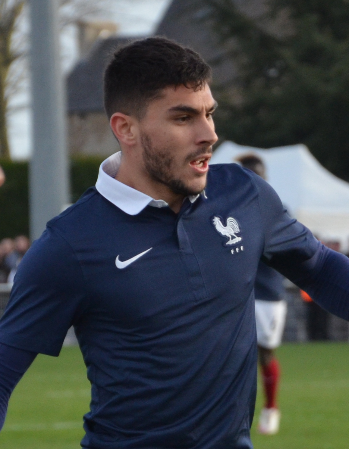 Photographie prise lors du match opposant la France à l'Angleterre pour les qualifications du championnat d'Europe de football des moins de 19 ans 2015 au stade Louis-Villemer de Saint-Lô le 31 mars 2015. Ici, Neal Maupay.